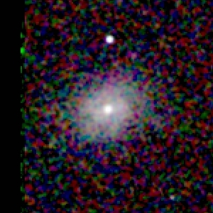 Galaxy NGC 12